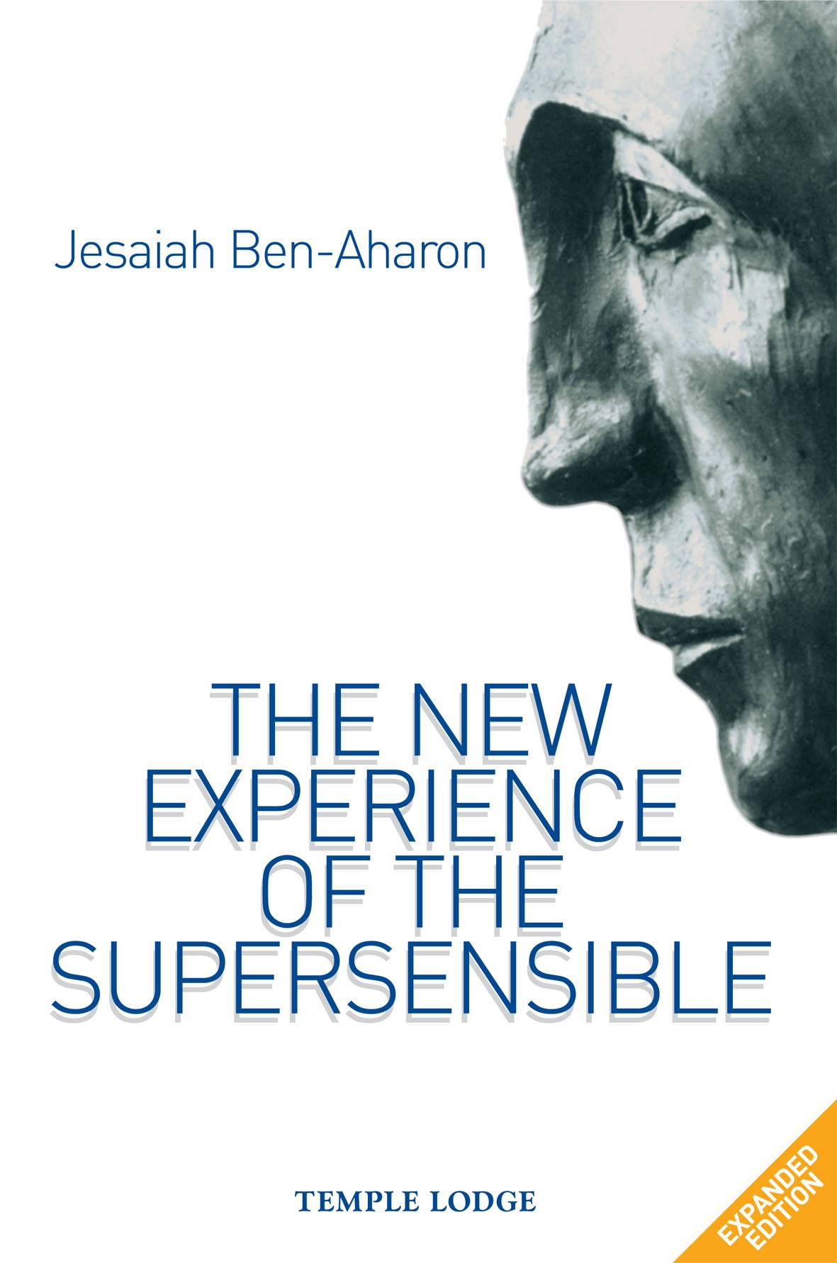 הספר ״ההתנסות העל-חושית החדשה״